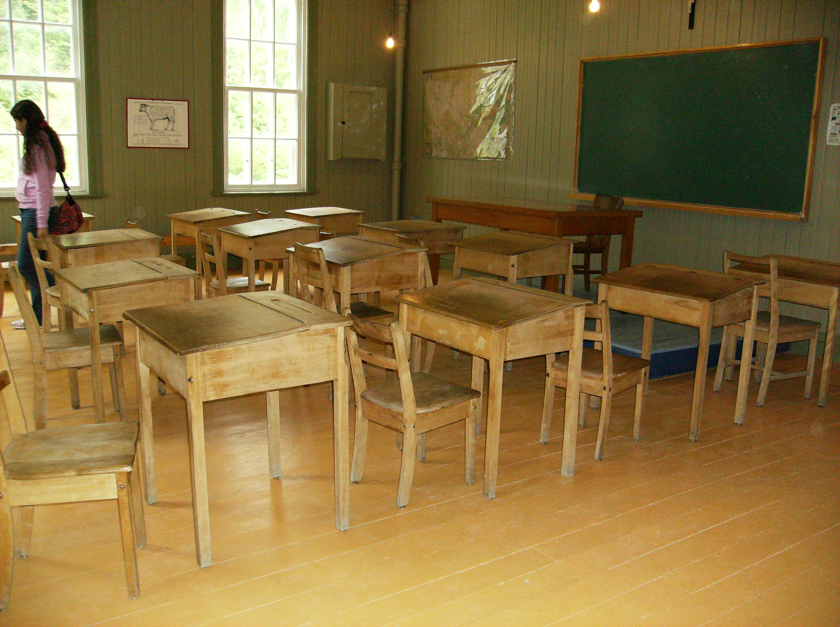 intérieur historique de l'école du Val Jalbert Québec Canada